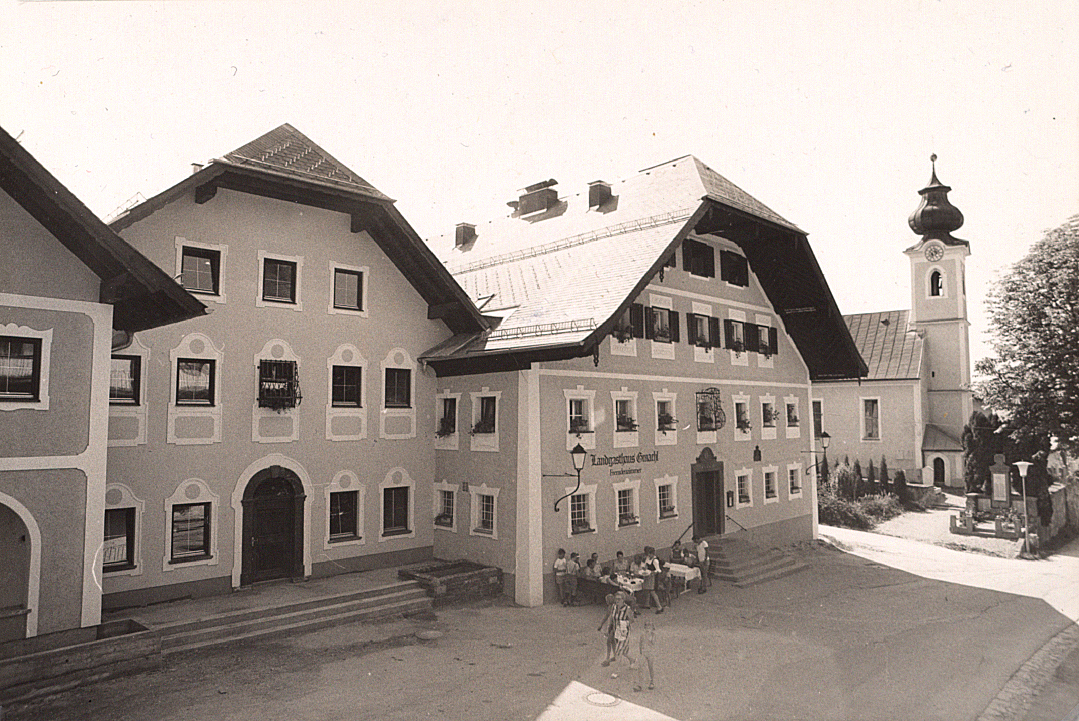 Gasthaus GMACHL in Elixhausen in den 1920er/30er Jahren